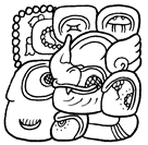 Majų glifas, simbolizuojantis miestą Copan. Padarytas naudojant freeware Maya font.